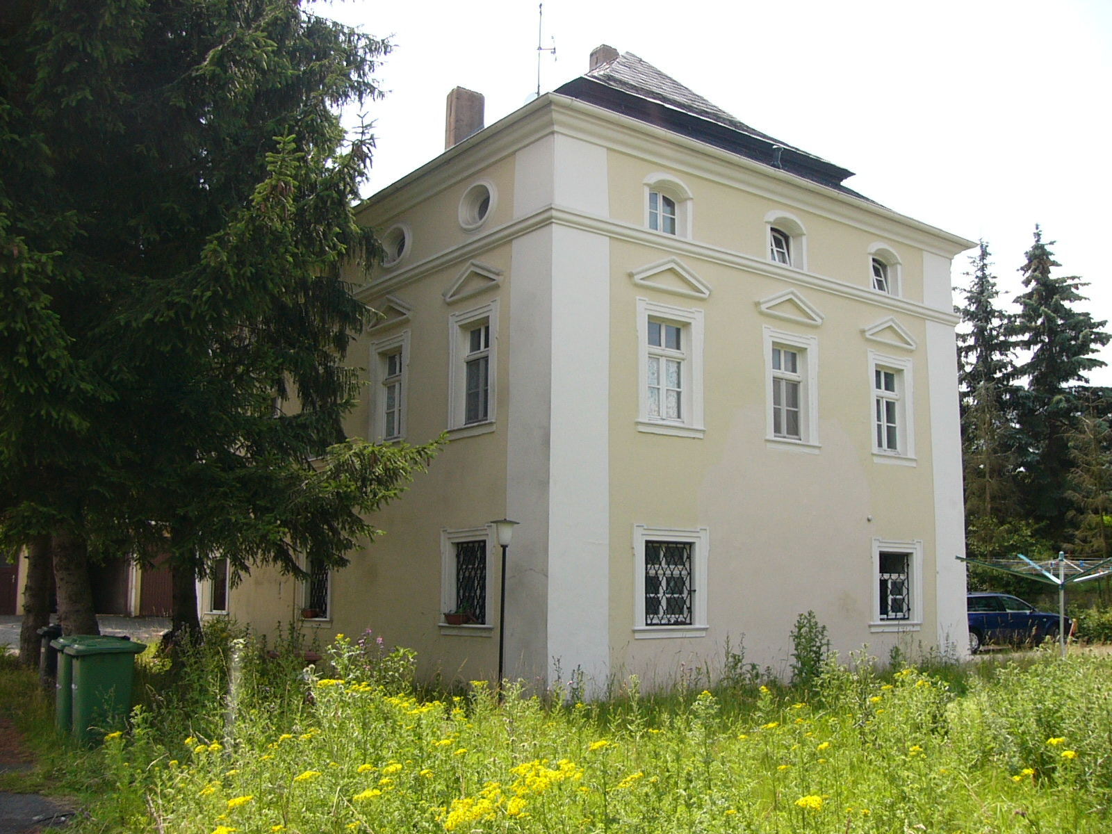 Stelzenhof, Hof